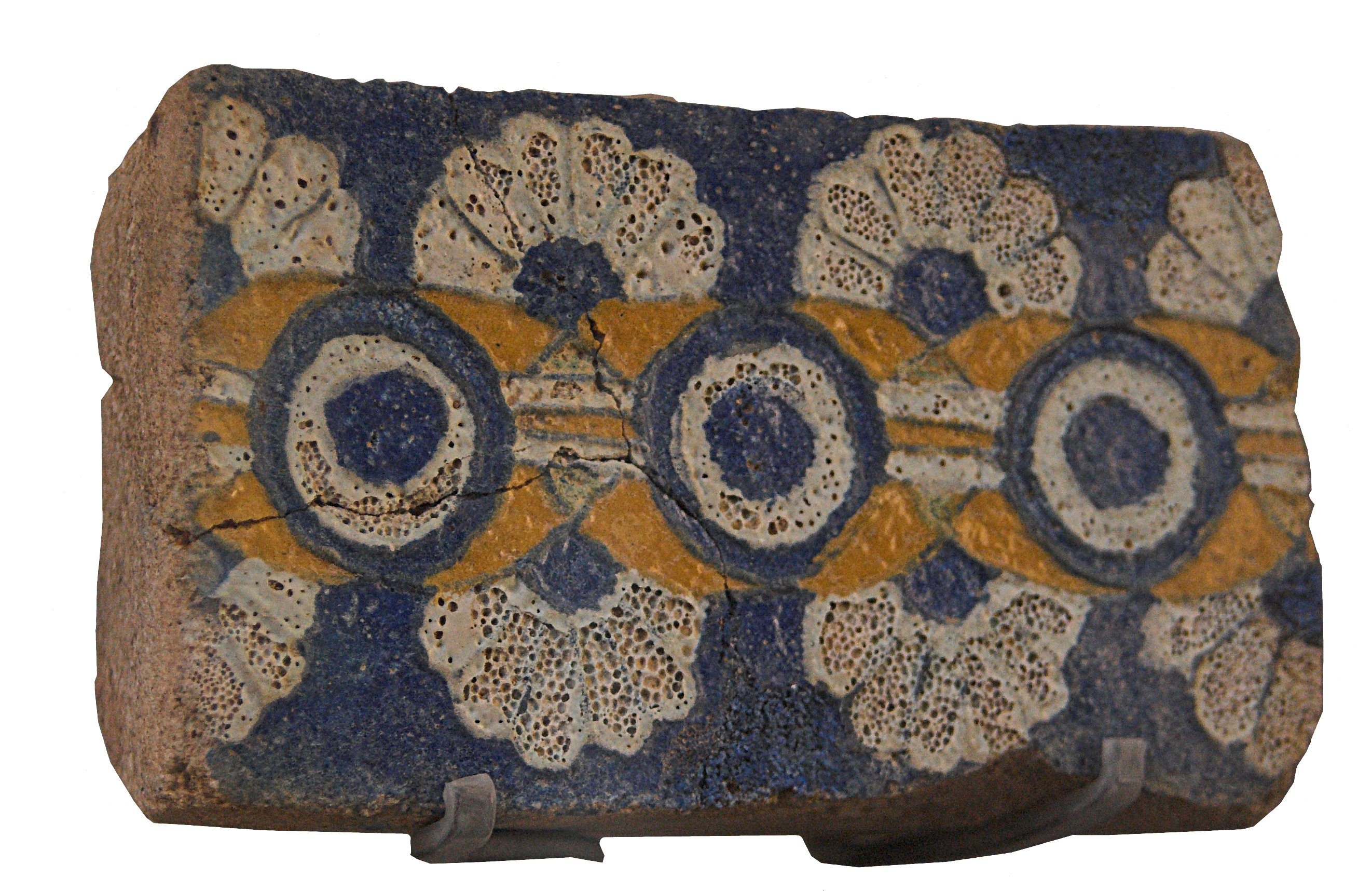 Fragment de brique à décor floral : motif d'encadrement. Epoque achéménide, fin VIe - IVe siècles avant J.-C. Suse. Brique siliceuse à glaçure